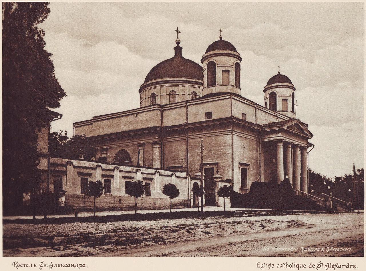 Костьол святого Олександра Київ 1911